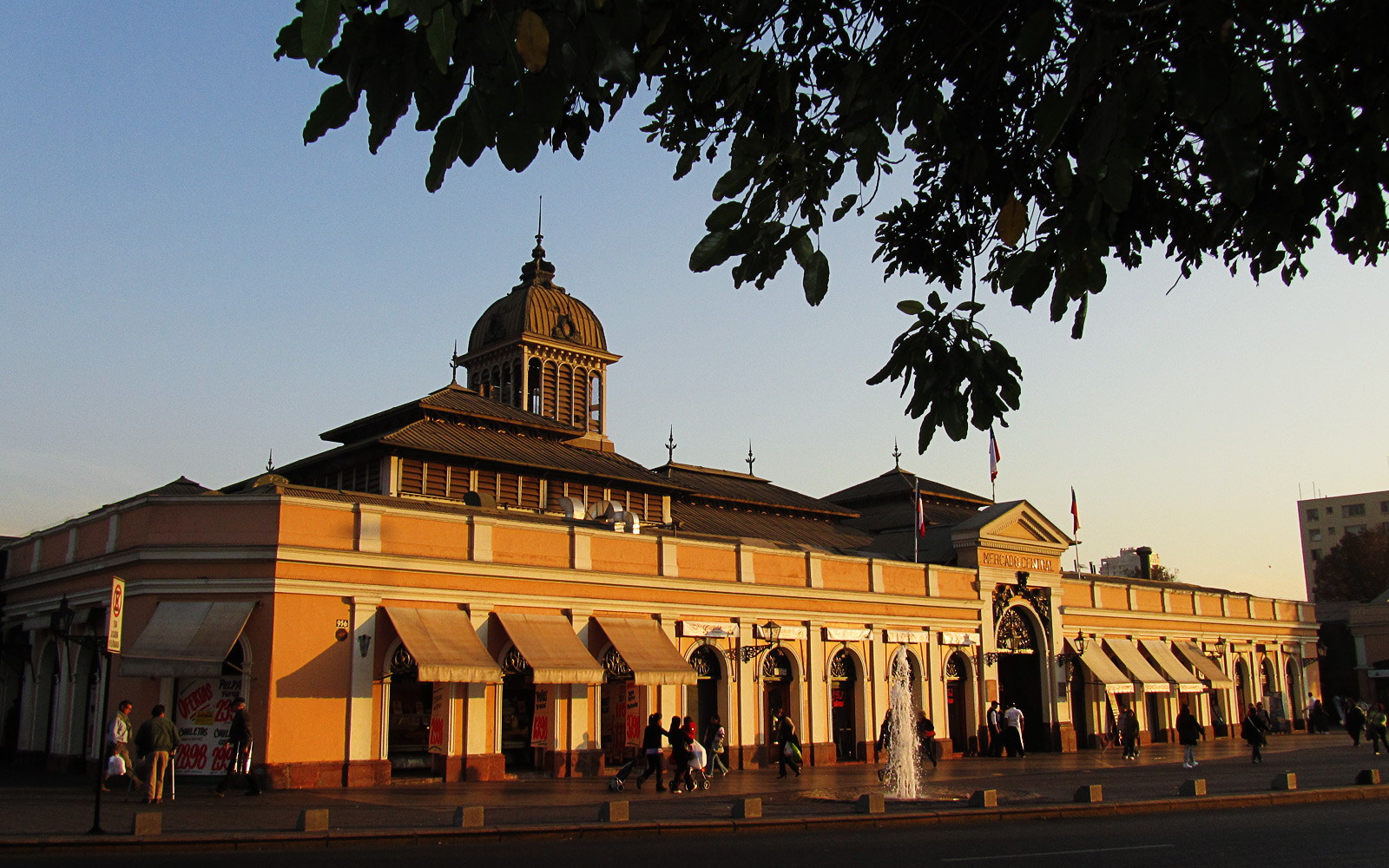 Mercado Central de Santiago This is a photo of a national monument in Chile: 860